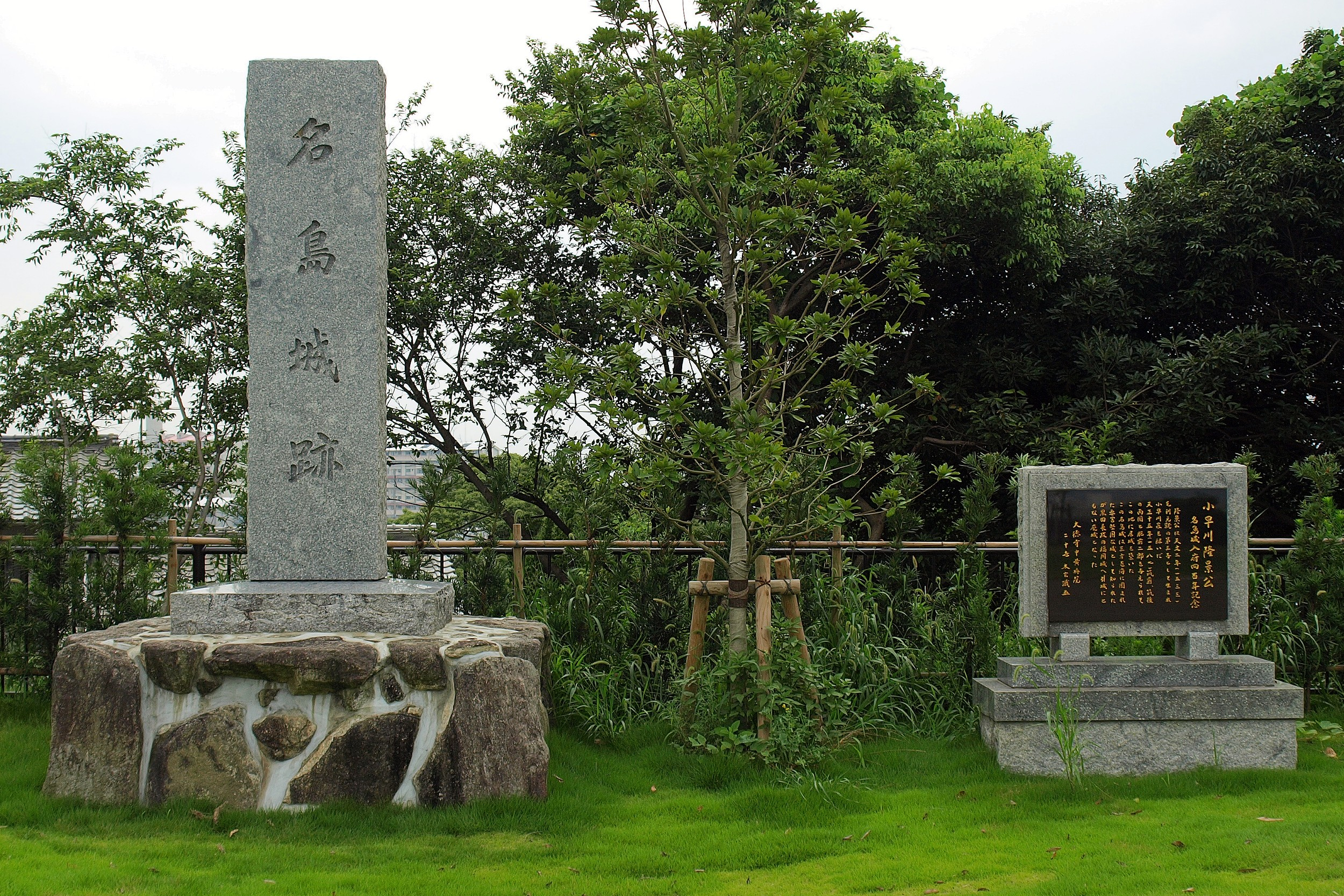 福岡市東区の名島城趾公園にある名島城趾の碑。2010年7月30日撮影。